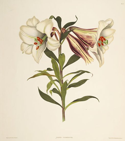 Lilium brownii var. viridulum (syn. Lilium japonicum var. colchesteri)